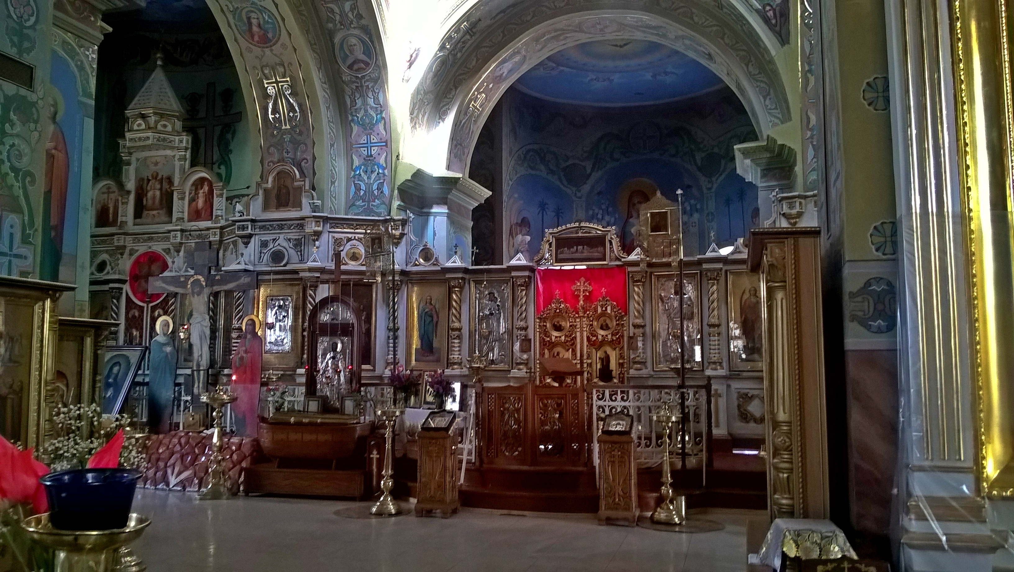 Sobór w Biełgorodzie